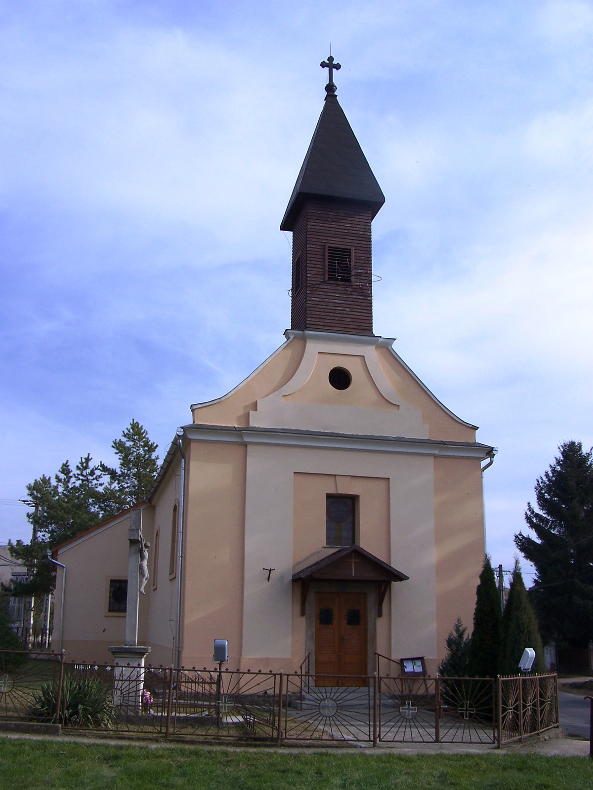 Szent István király Római katolikus templom (Váchartyán, Fő u.) This is a photo of a monument in Hungary. Identifier: 7566